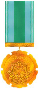 "Tərəqqi" medalı